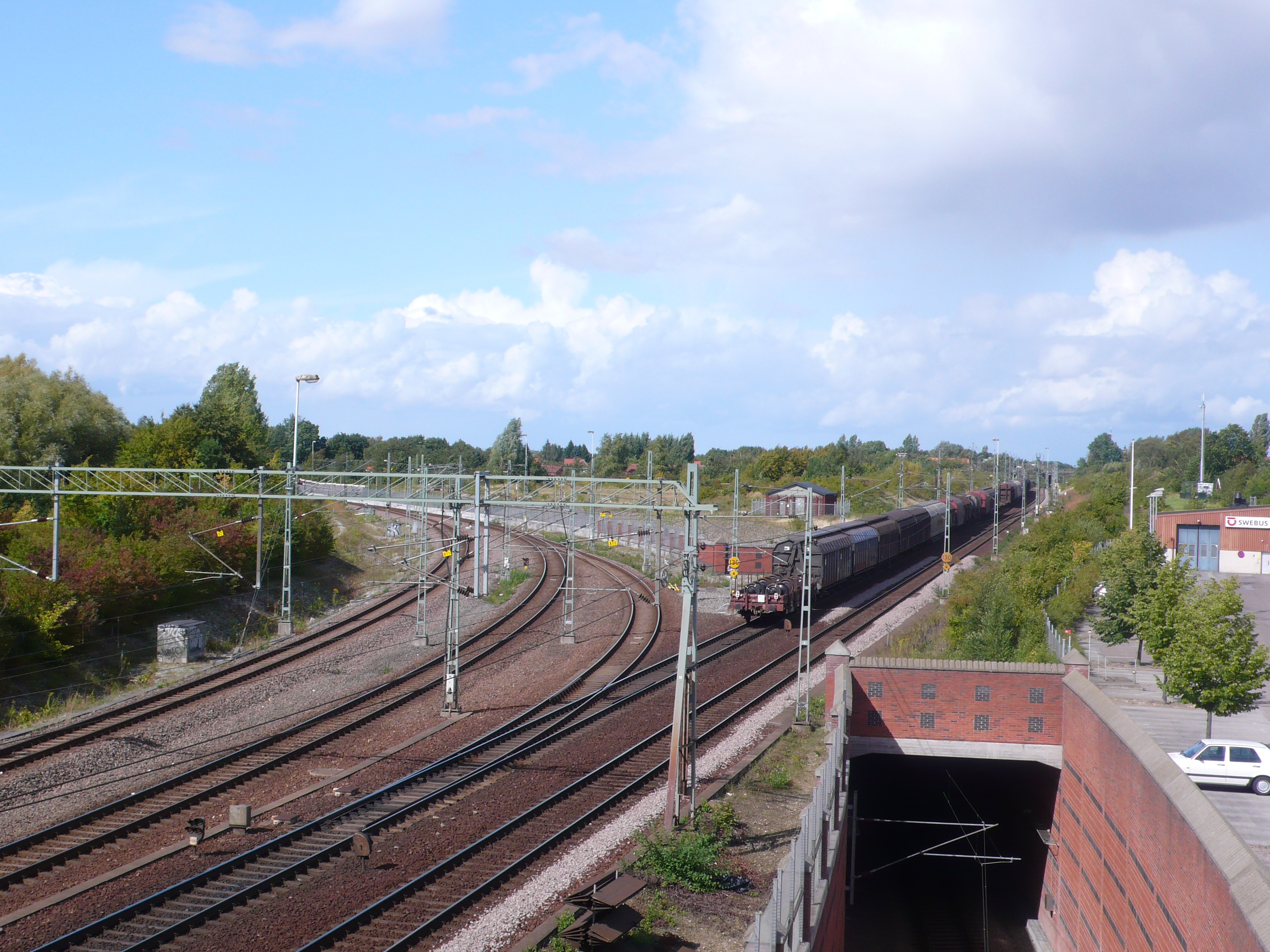 Zweigung der Västkustbanan und Södra stambanan in Lund. Blick Richtung Norden vom Kung Oskars väg.